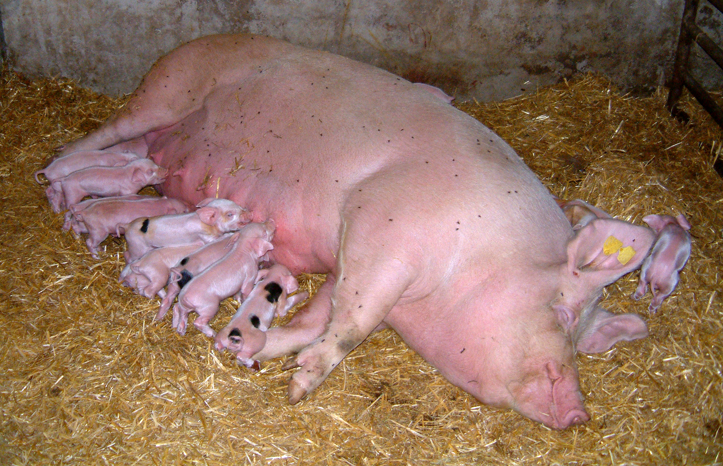 Sau mit Ferkeln